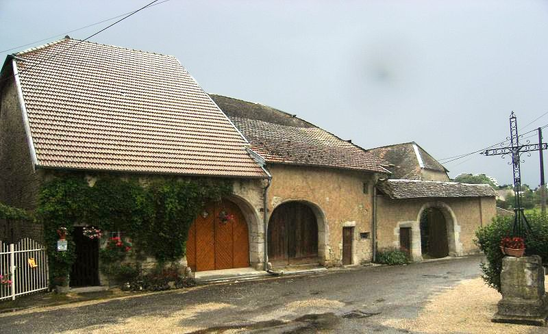 Maisons comtoises dans le village de Velleclaire (département de Haute-Saône)